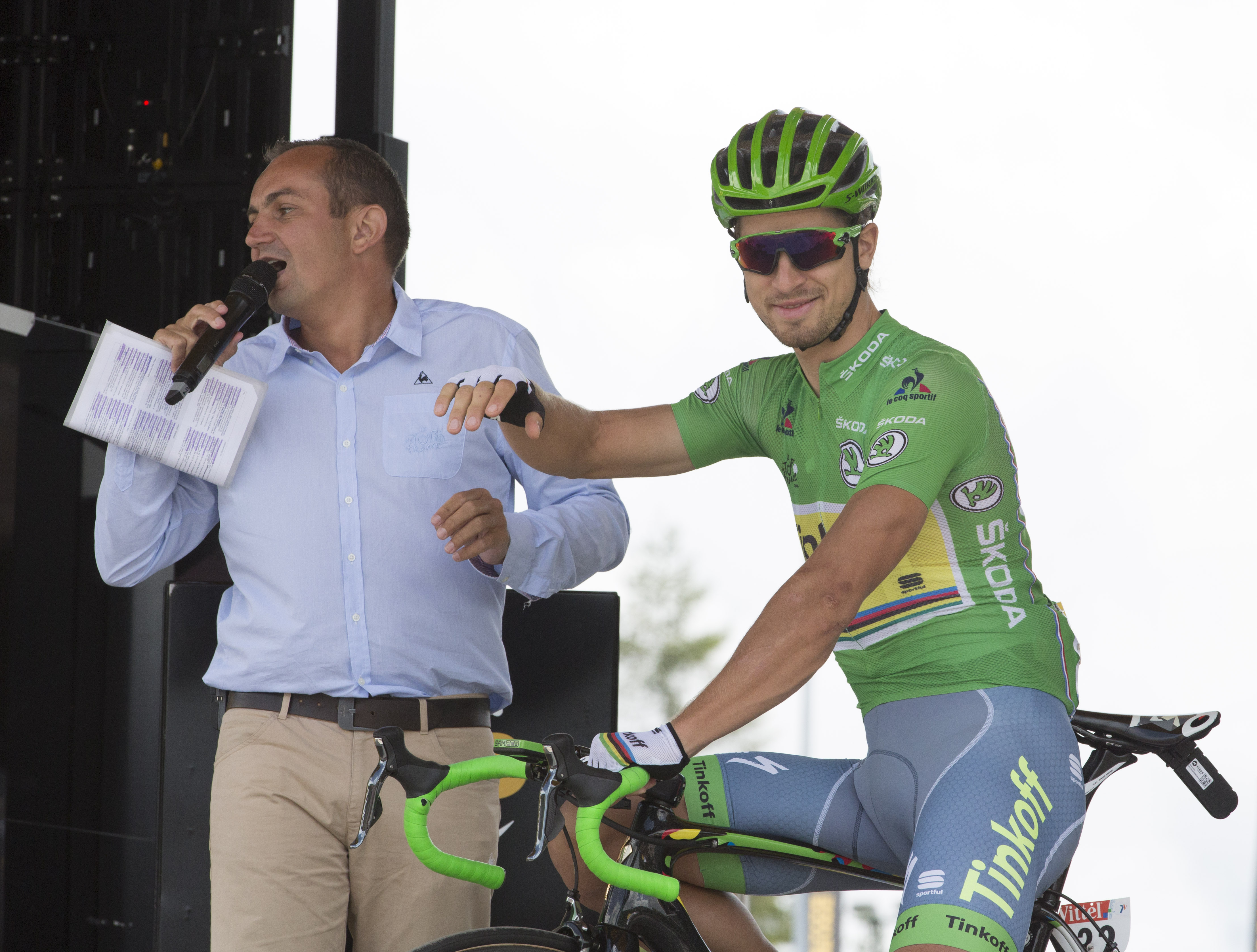 Peter Sagan